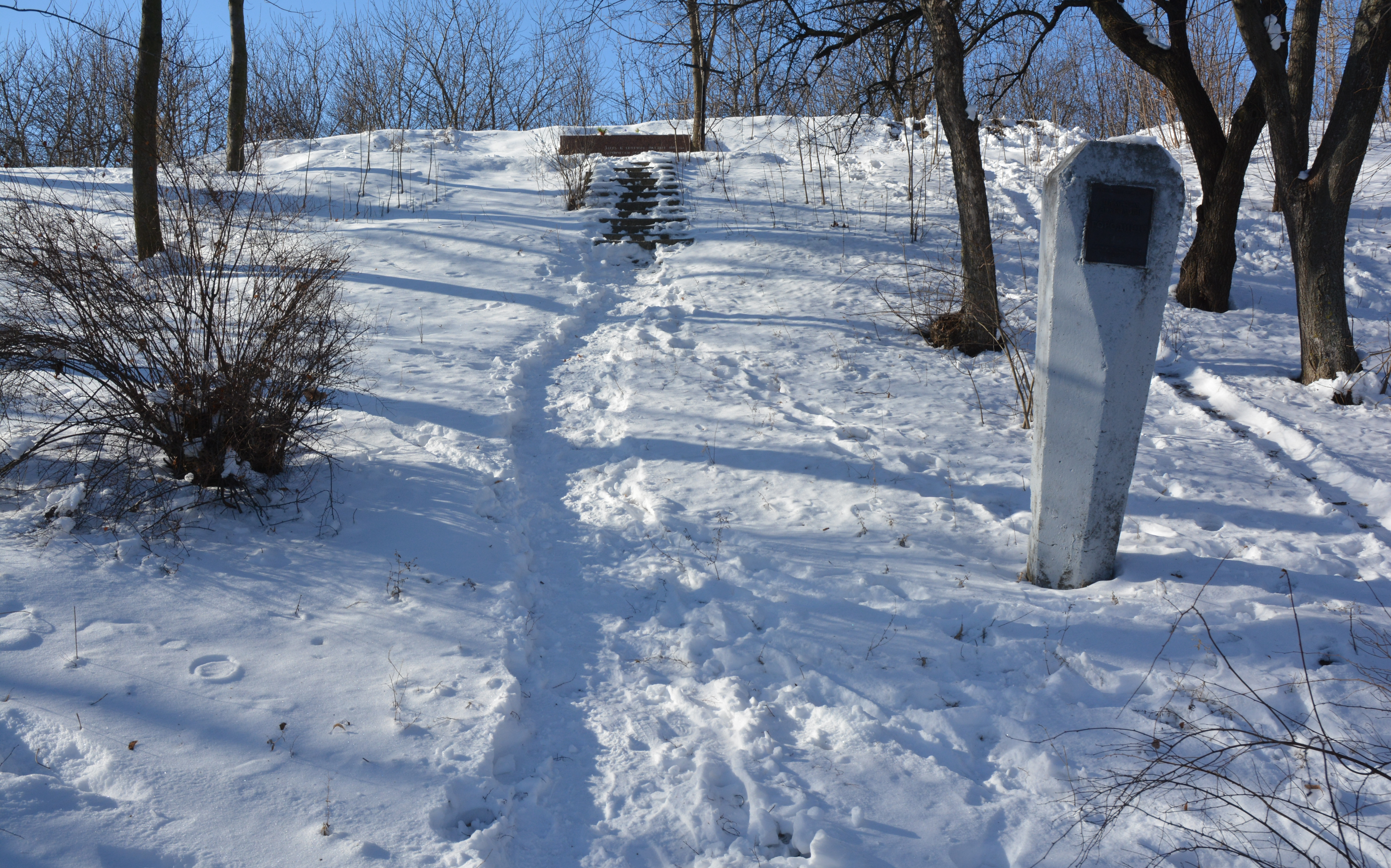 Городище літописного міста Вишгорода, Вишгород, вул. П. Калнишевського